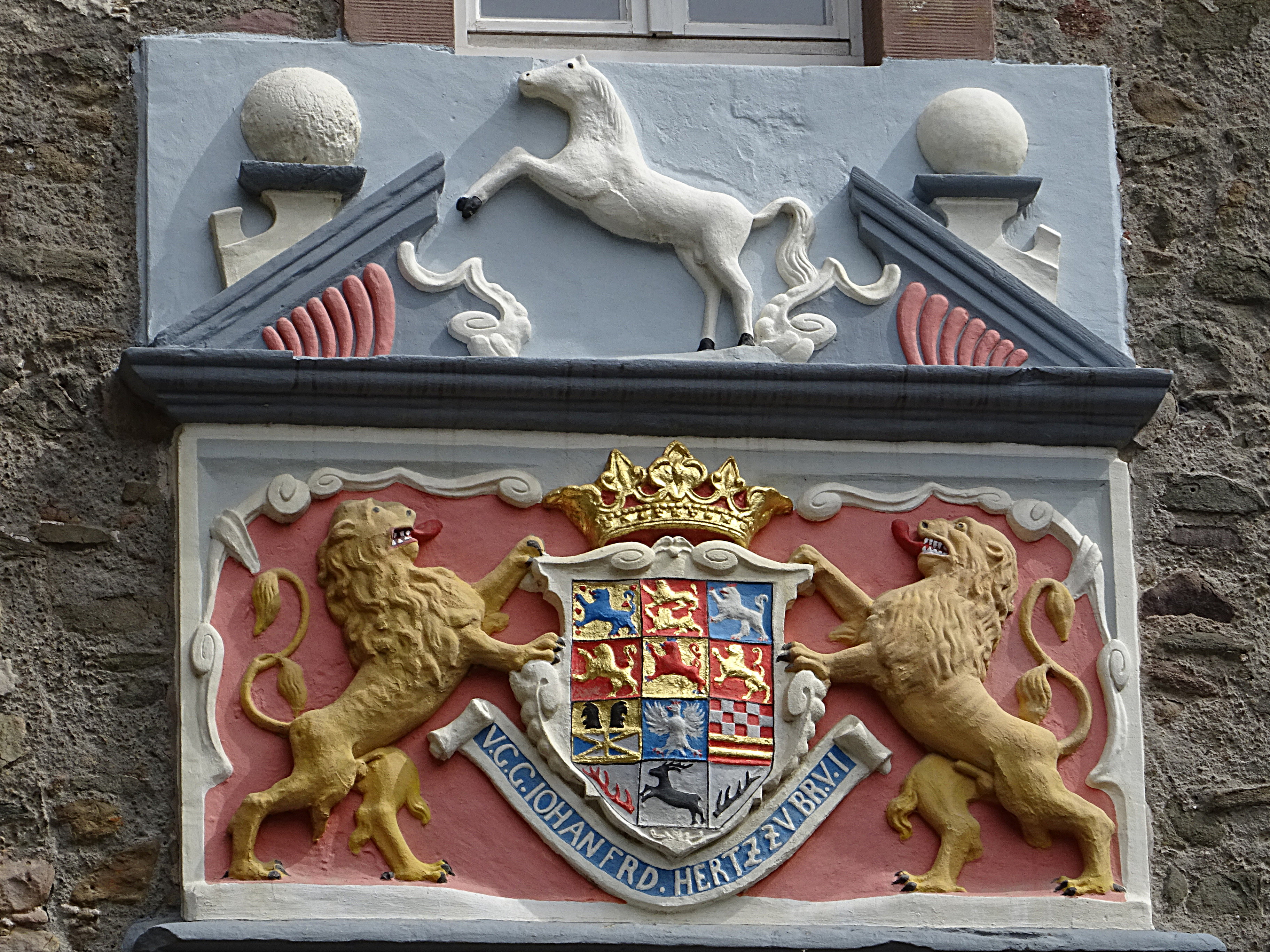 Wappen des Herzogtums Braunschweig mit Niedersachsen-Ross am Schloss Herzberg